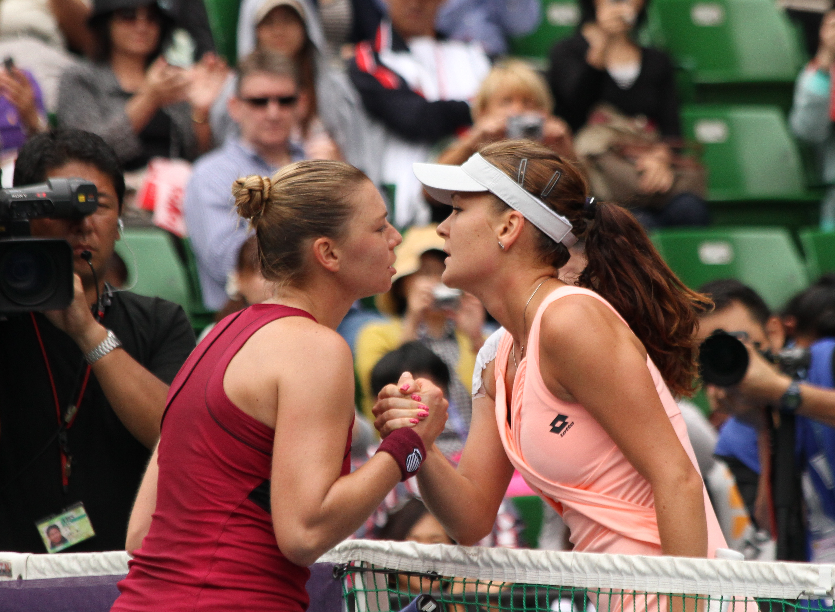 Agnieszka Radwańska and Vera Zvonareva at 2011 Pan Pacific Open